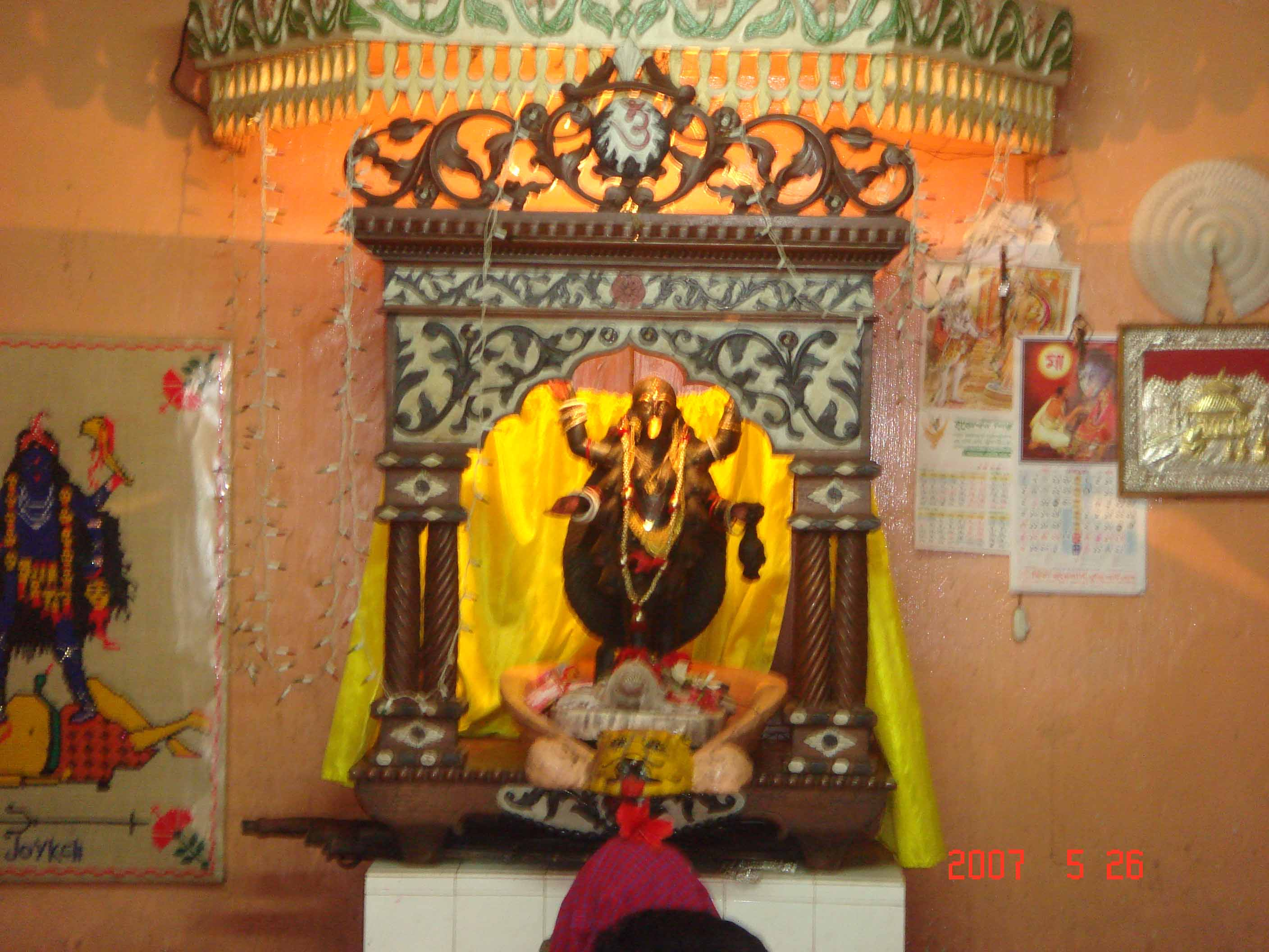 Boro Kali Temple